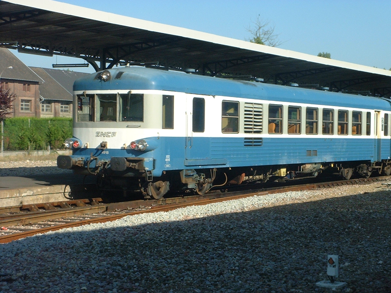 Autorail SNCF X4900 à Dieppe